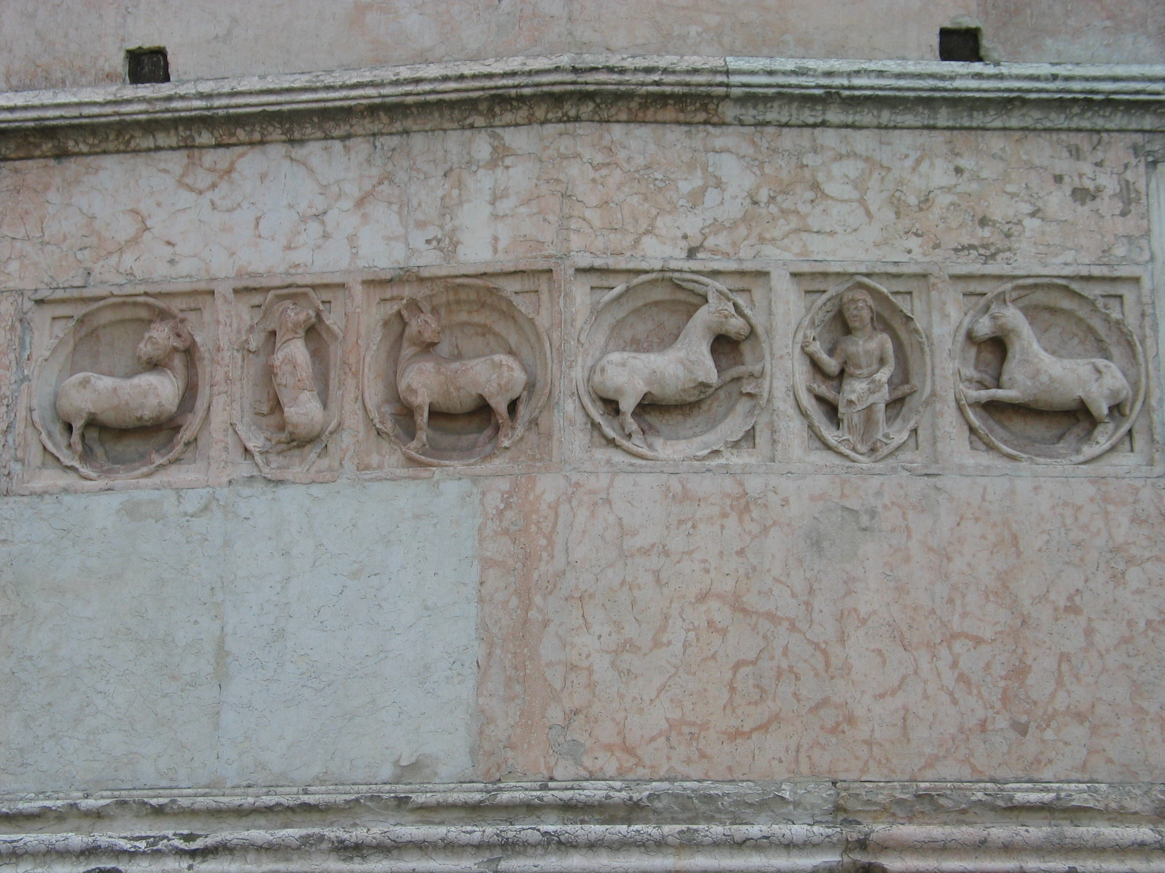 détail de la façade du baptistère de Parma